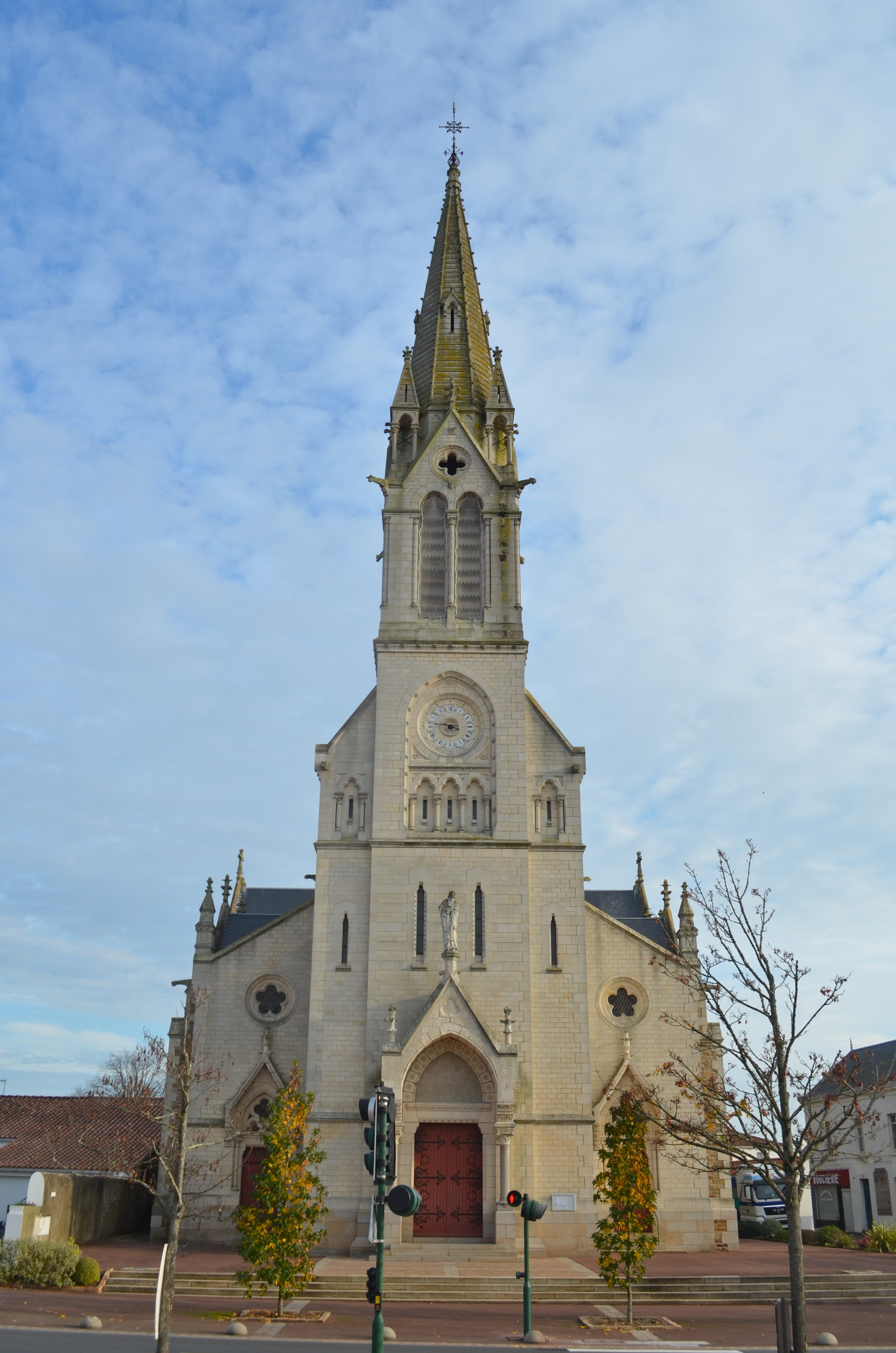 Eglise de Soullans (Vendée)